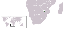 Description:Carte de localisation du Venda, Afrique du Sud Auteur:Rémih